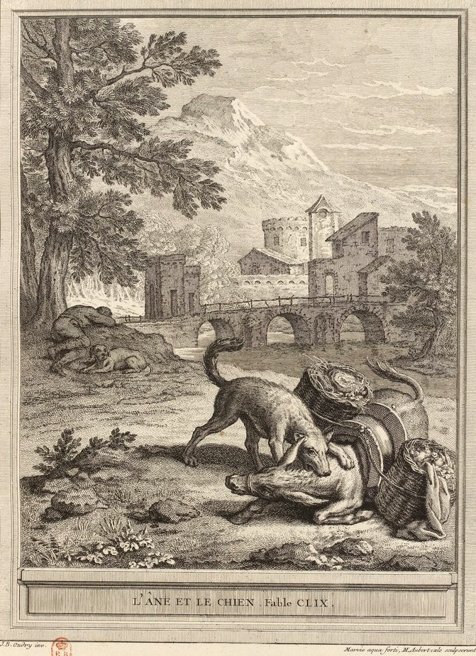 Gravure réalisée par Martin Marvie d'après un dessin de Jean-Baptiste Oudry représentant la fable L'âne et le chien de Jean de La Fontaine (fable 17 du livre VIII). Cette gravure est parue dans l'édition complète des fables de La Fontaine, parue en quatre tomes chez l'éditeur Desaint & Saillant, rue saint Jean de Beauvais à Paris, 1755-1759.